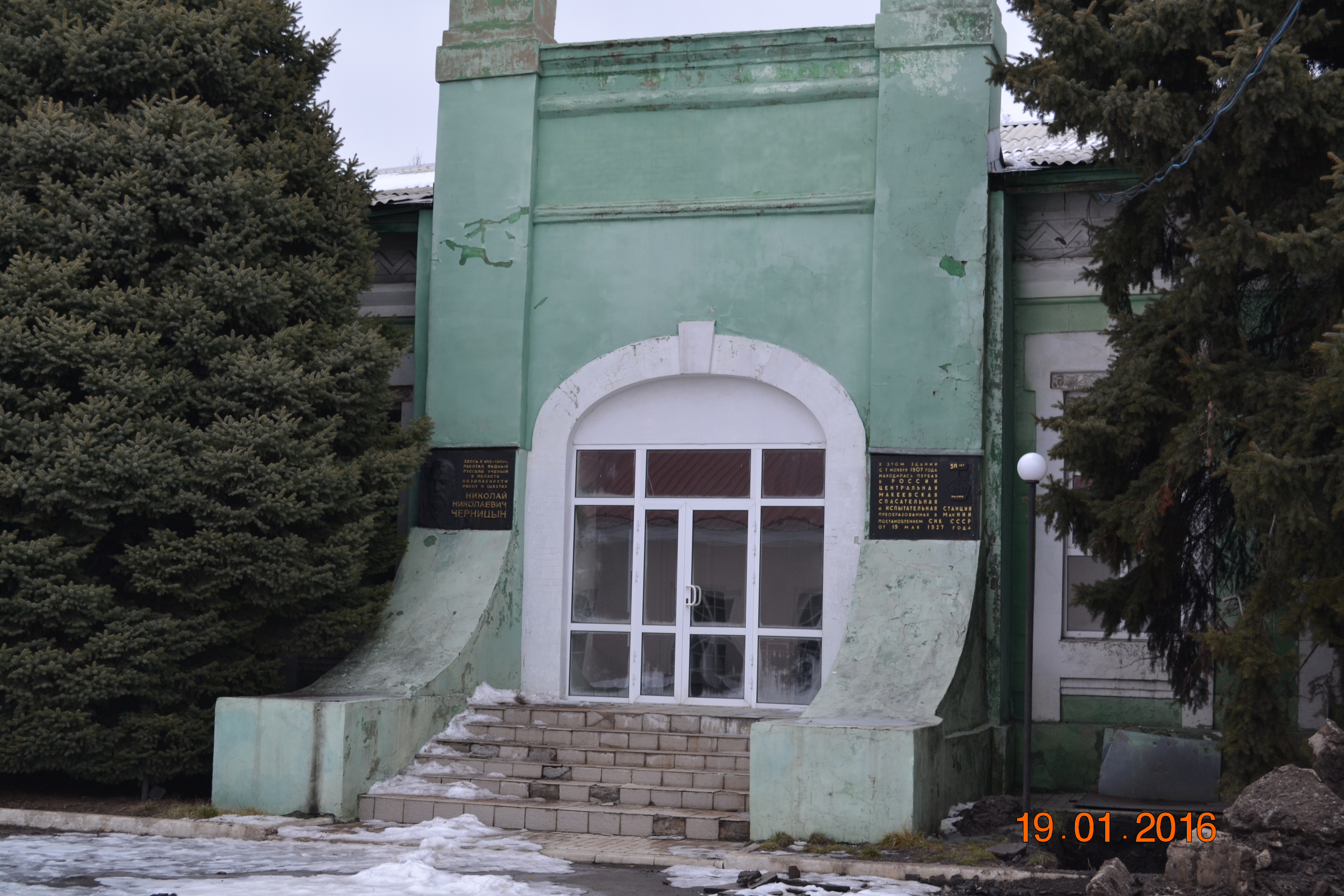 Сохранившееся здание Центральной спасательной станции (ныне - музей МакНИИ)